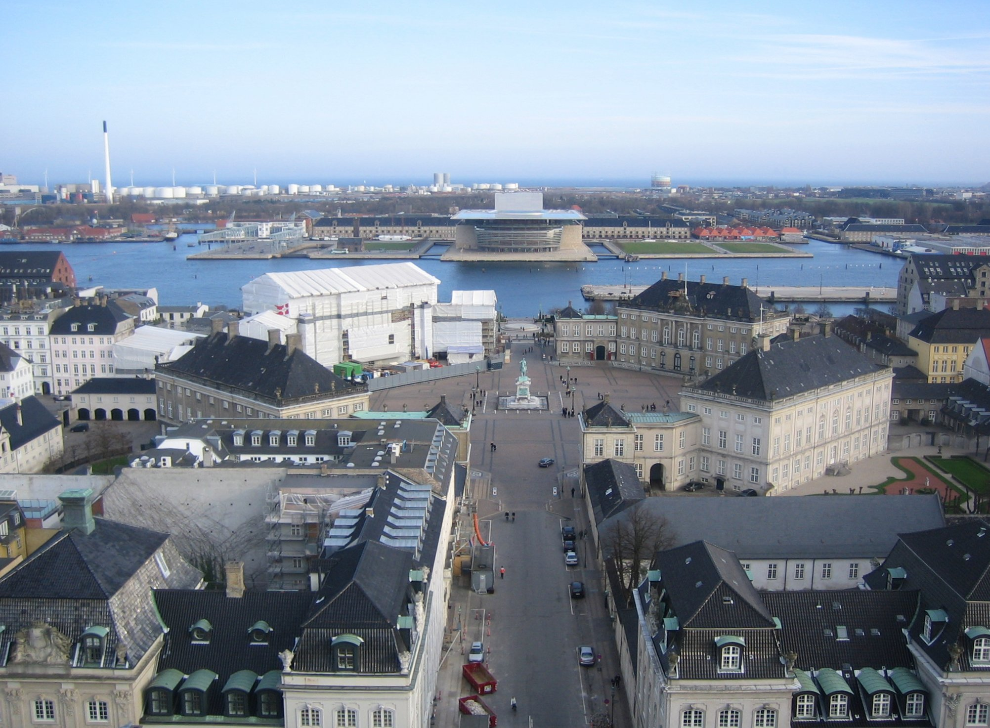 Amalienborg seen from Marmorkirken